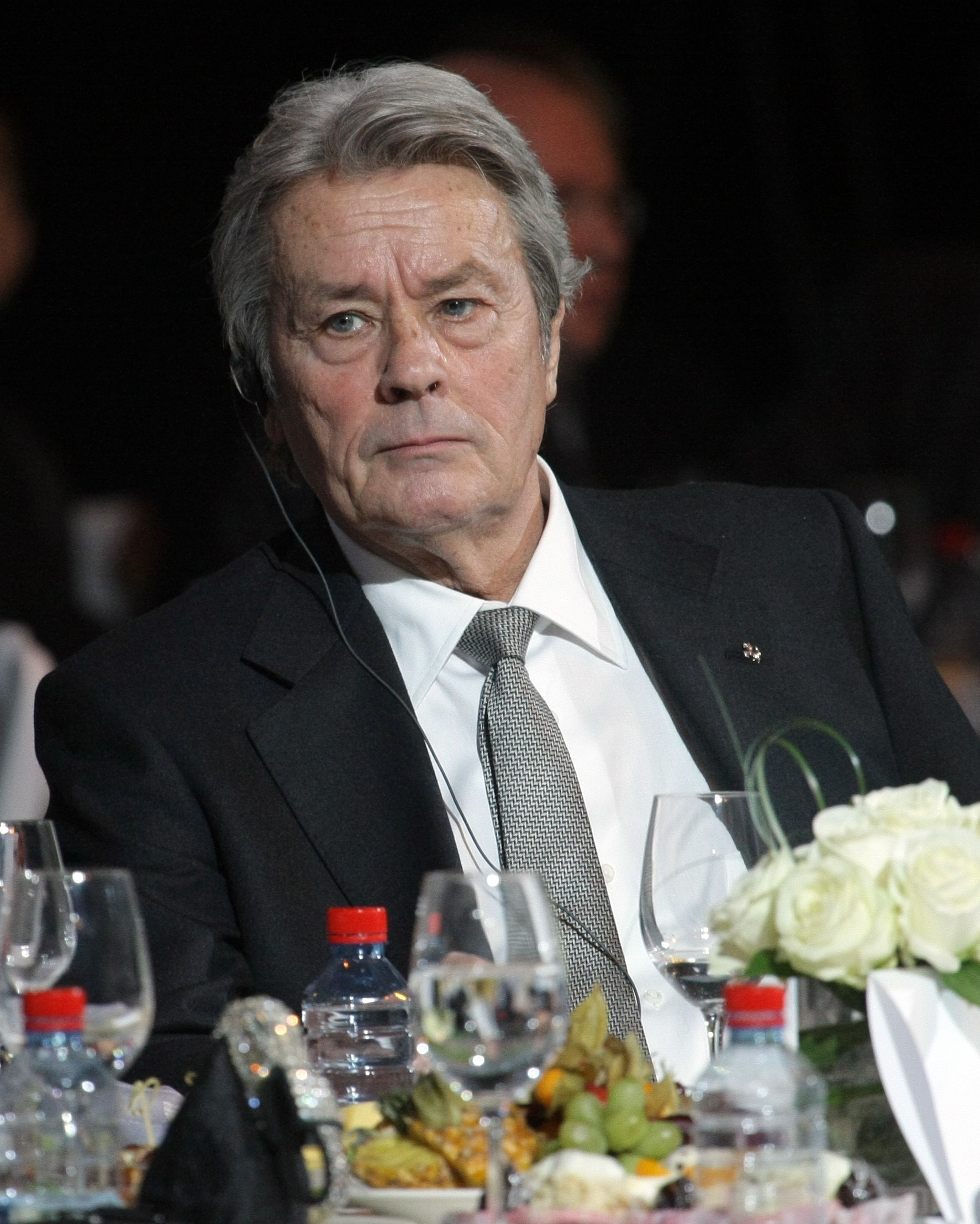 Французский актер театра и кино Ален Делон на благотворительном концерте в поддержку деятельности России по борьбе с детскими онкологическими и офтальмологическими заболеваниями